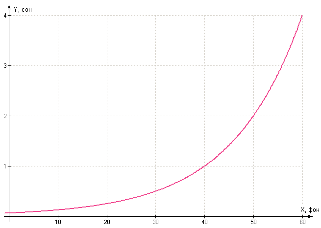 График зависимости значений громкости в сонах от уровня в фонах